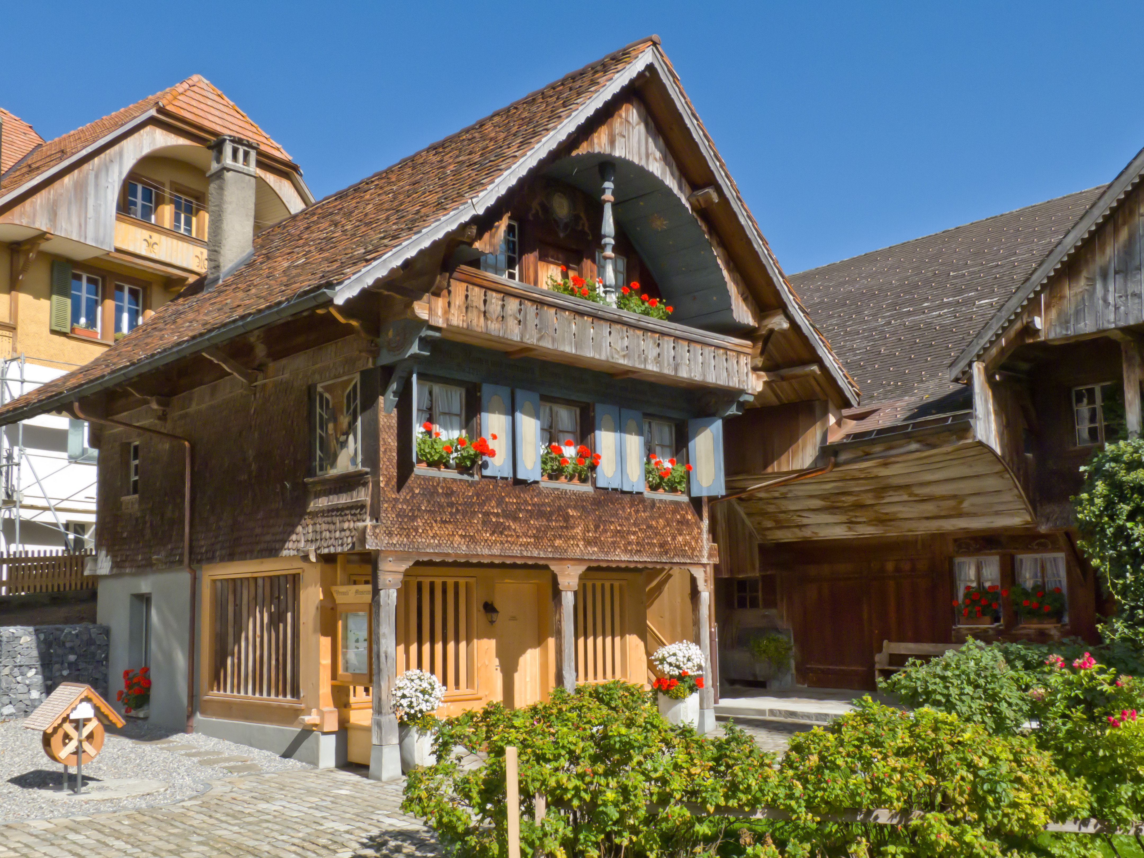 Trifelers Babis Stöckli in Guggisberg, Ortsmuseum, renoviert 2012